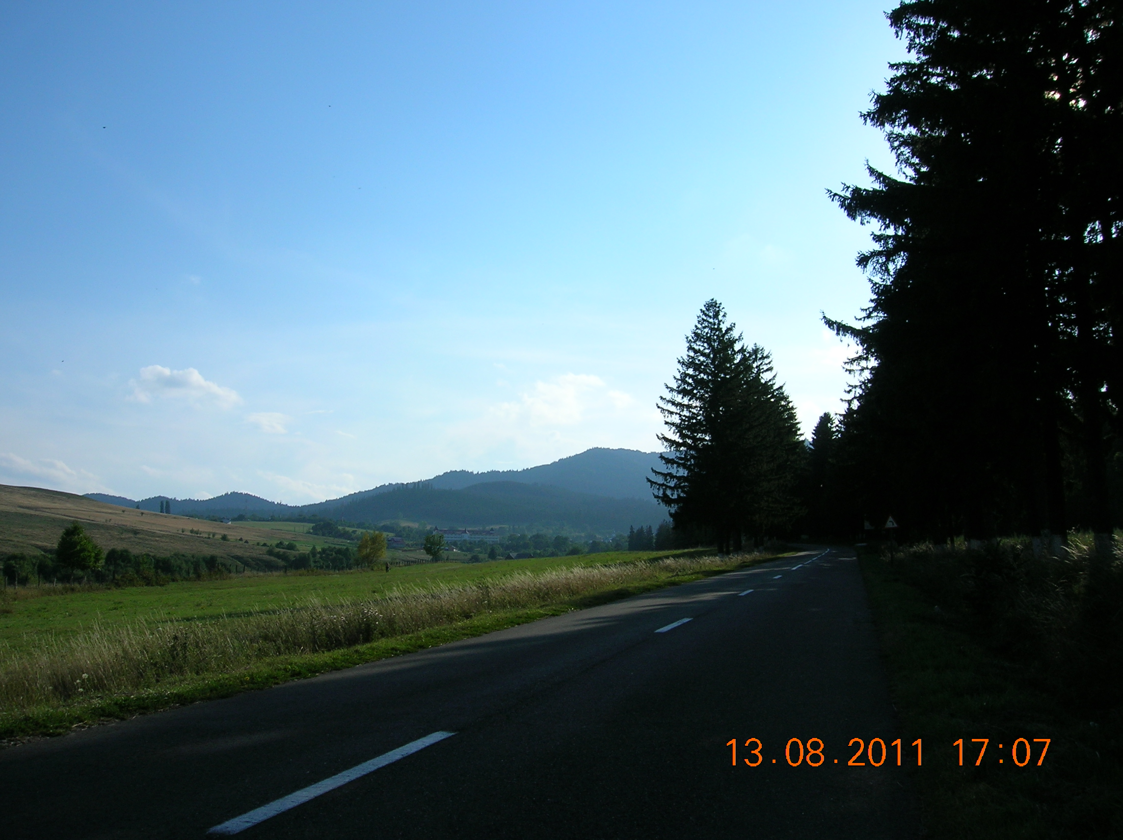 Jud. Neamţ, Munţii Stânişoarei, Parcul Natural Vânători Neamţ, spre Mănăstirea Văratec